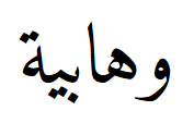 Ваххабия